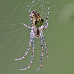 Herbstspinne (Metellina segmentata)